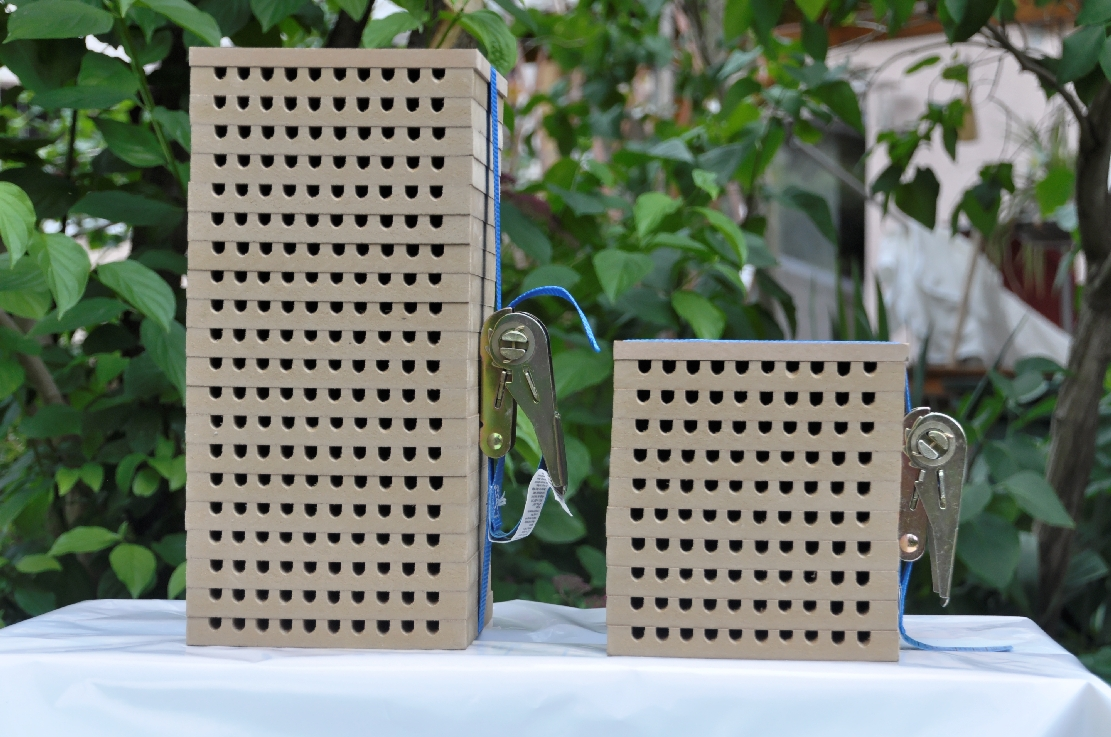 Mauerbienen -modulare Nisthilfe Nistbretter- von